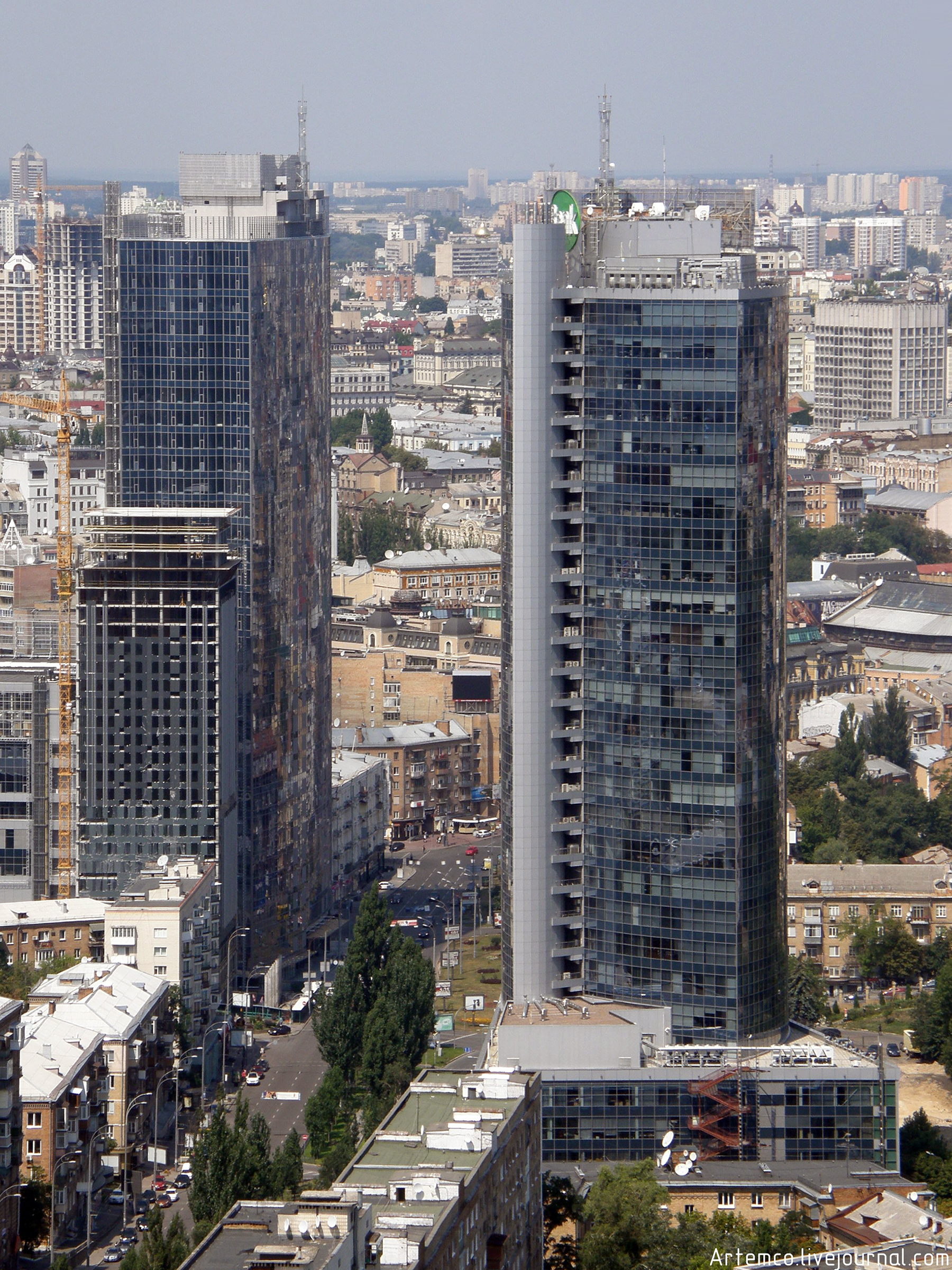 «Гулливер» и «Парус»